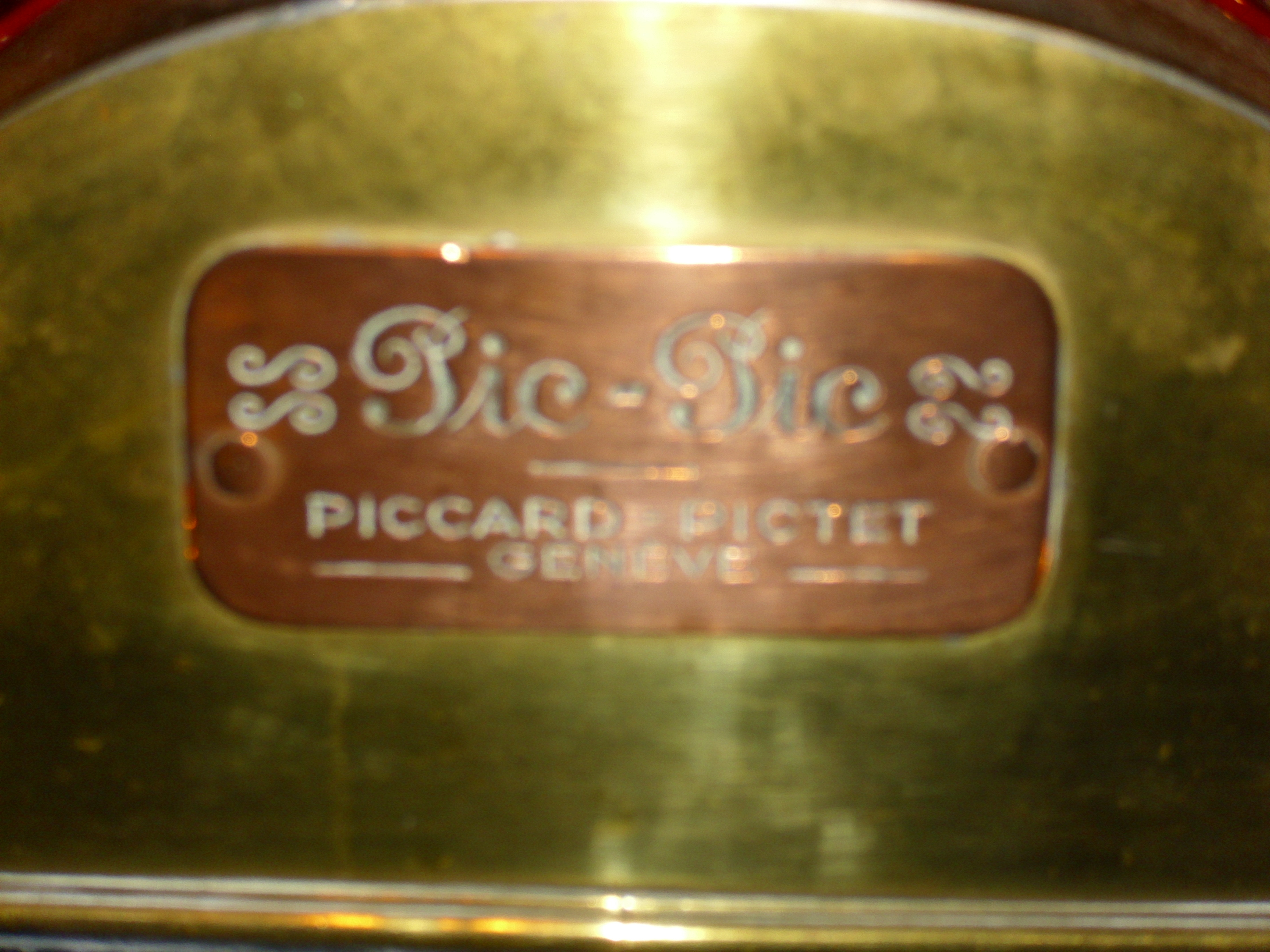 Emblem Pic-Pic